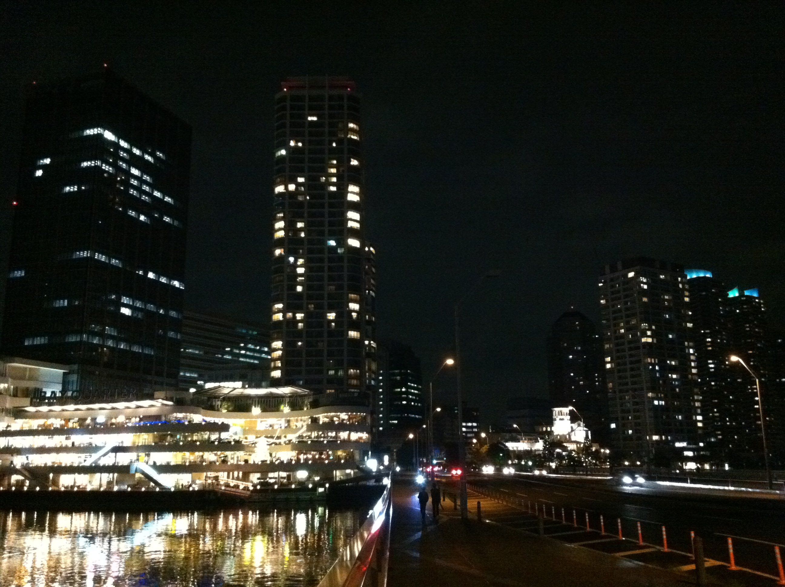 横浜市神奈川区のポートサイド地区とベイクォーター。